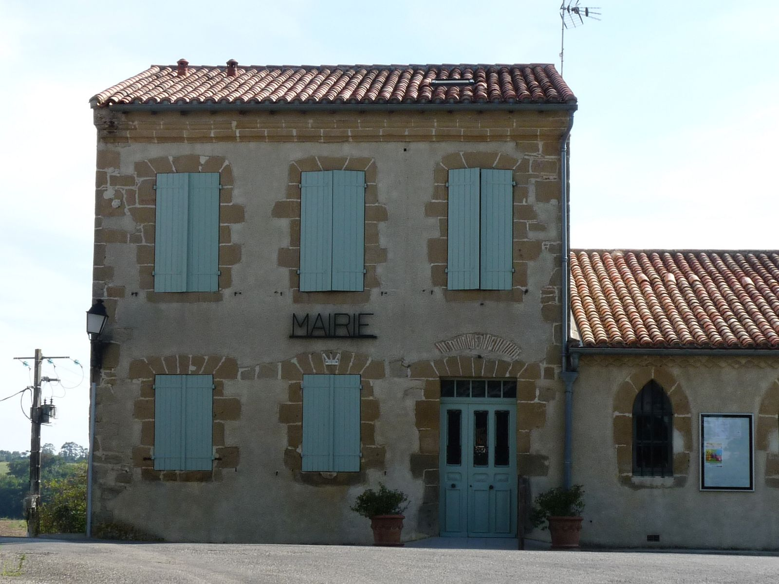 Mairie de Rieumajou, Haute-Garonne, France